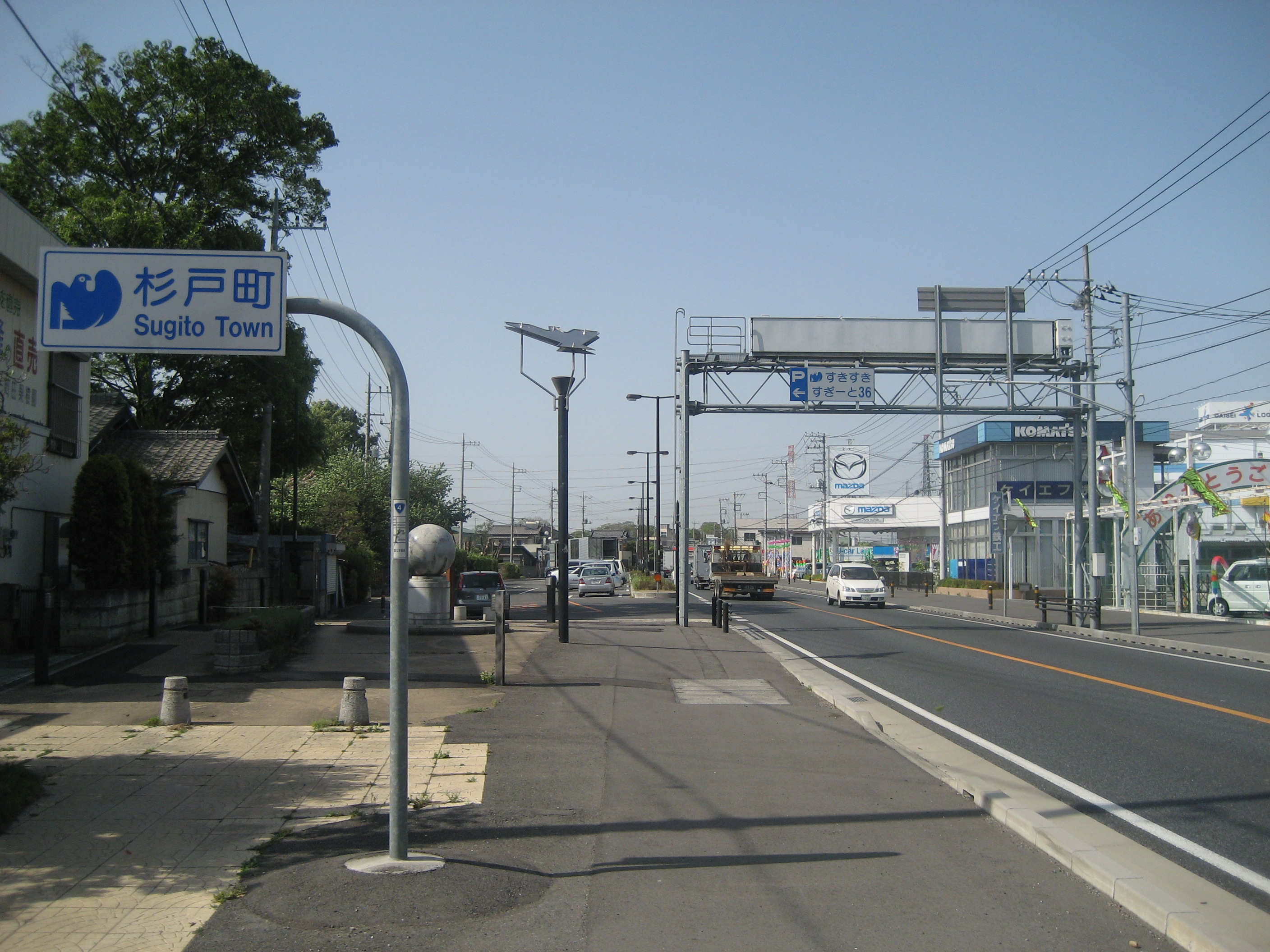 国道4号線すきすきすぎーと３６埼玉県北葛飾郡杉戸町内